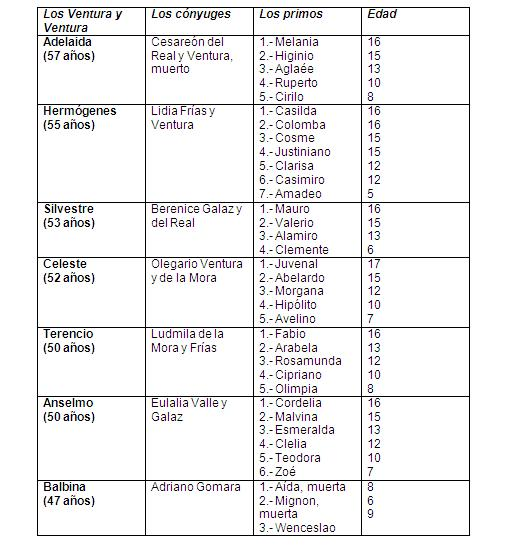 Tabla